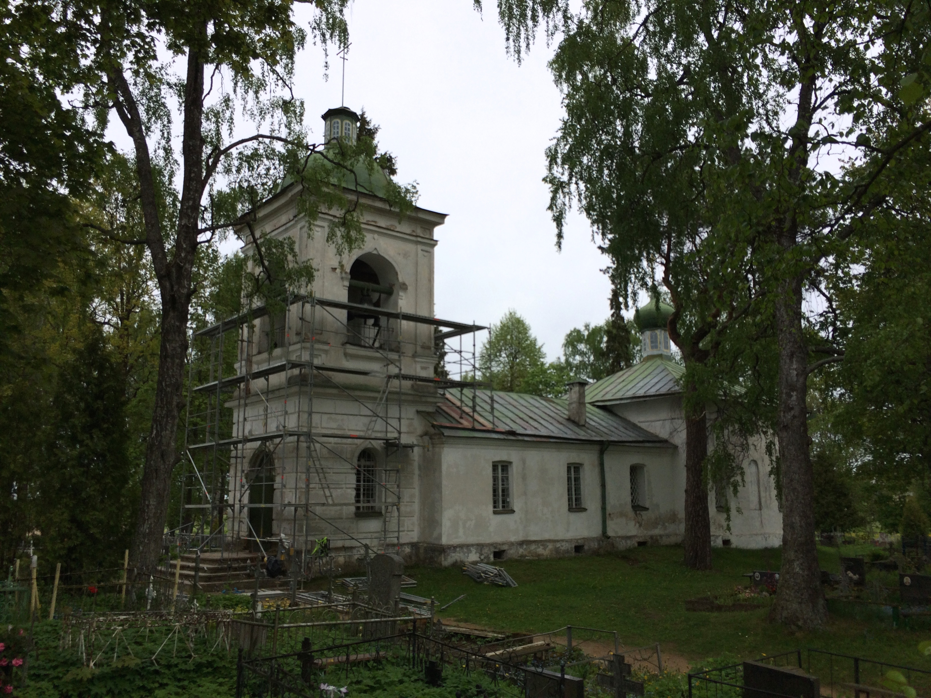 Saatse Püha Paraskeva kirik (2015)